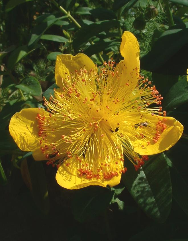 Millepertuis à grandes fleurs, Bucey-lès-Gy